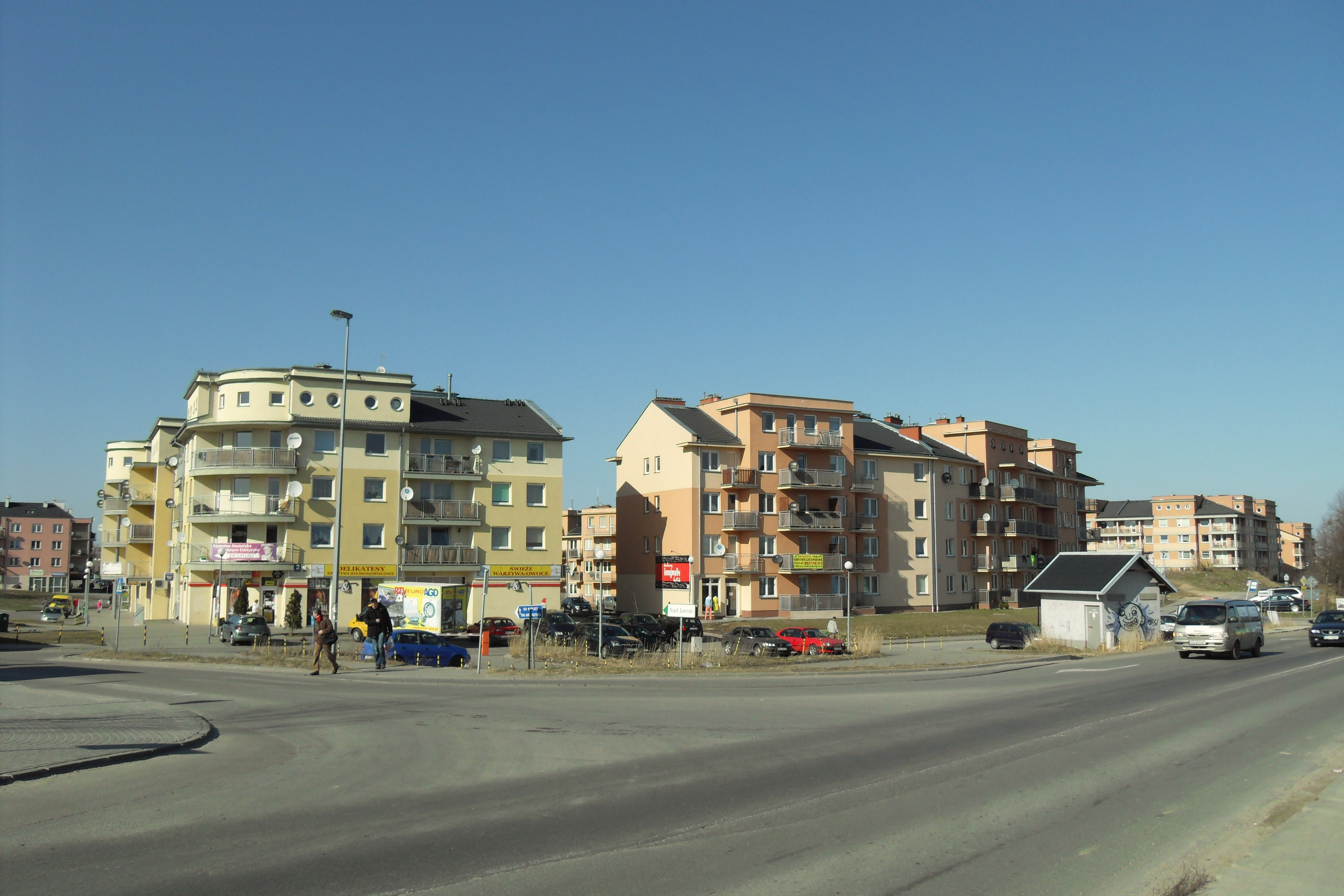 Gdańsk. Osiedle Świętokrzyskie, po lewej budynek ul. Guderskiego 2, w środku budynek ul. Świętokrzyska 134.